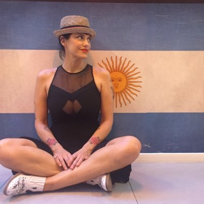 Biografia